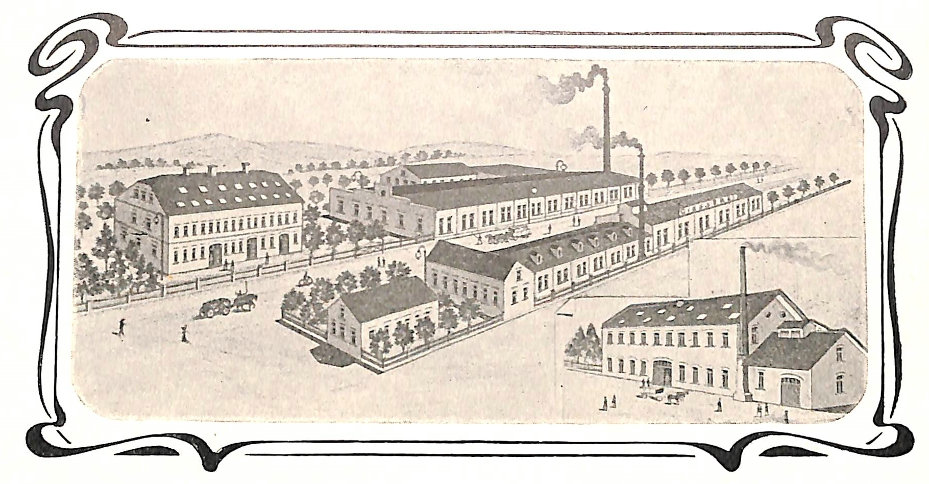 (fiktive) Ansicht des Sächsischen Messingwerks C.G. Wellner's Söhne in Rodewisch. Im Jahr 1603 wurde am Ortsrand von Rodewisch ein Eisenhammer mit kurfürstlicher Erlaubnis und Förderung in ein Messingwerk umgebaut. Nach der Werksgründung gelangte das Unternehmen pfandweise in den Besitz zahlreicher sächsischer Adelsfamilien, auch wurde es einem Rittergut mit 226 Hektar zugeteilt. Im Jahr 1887 kaufte der Industrielle Christinan G. Wellner das bankrotte Werk nebst Rittergut. Der Wiederaufbau gelang rasch. Die Fabrikation von Messingwaren und Kupferdrähten war sehr einträglich, als zusätzlicher Zweig wurde um 1900 die Besteckfertigung mit neuesten galvanischen Anlagen zum Versilbern sowie die Fertigung von Musikinstrumenten aufgebaut, nach 1910 wurde auch die Fabrikation von beliebigen Messingteilen für Automobilhersteller begründet.